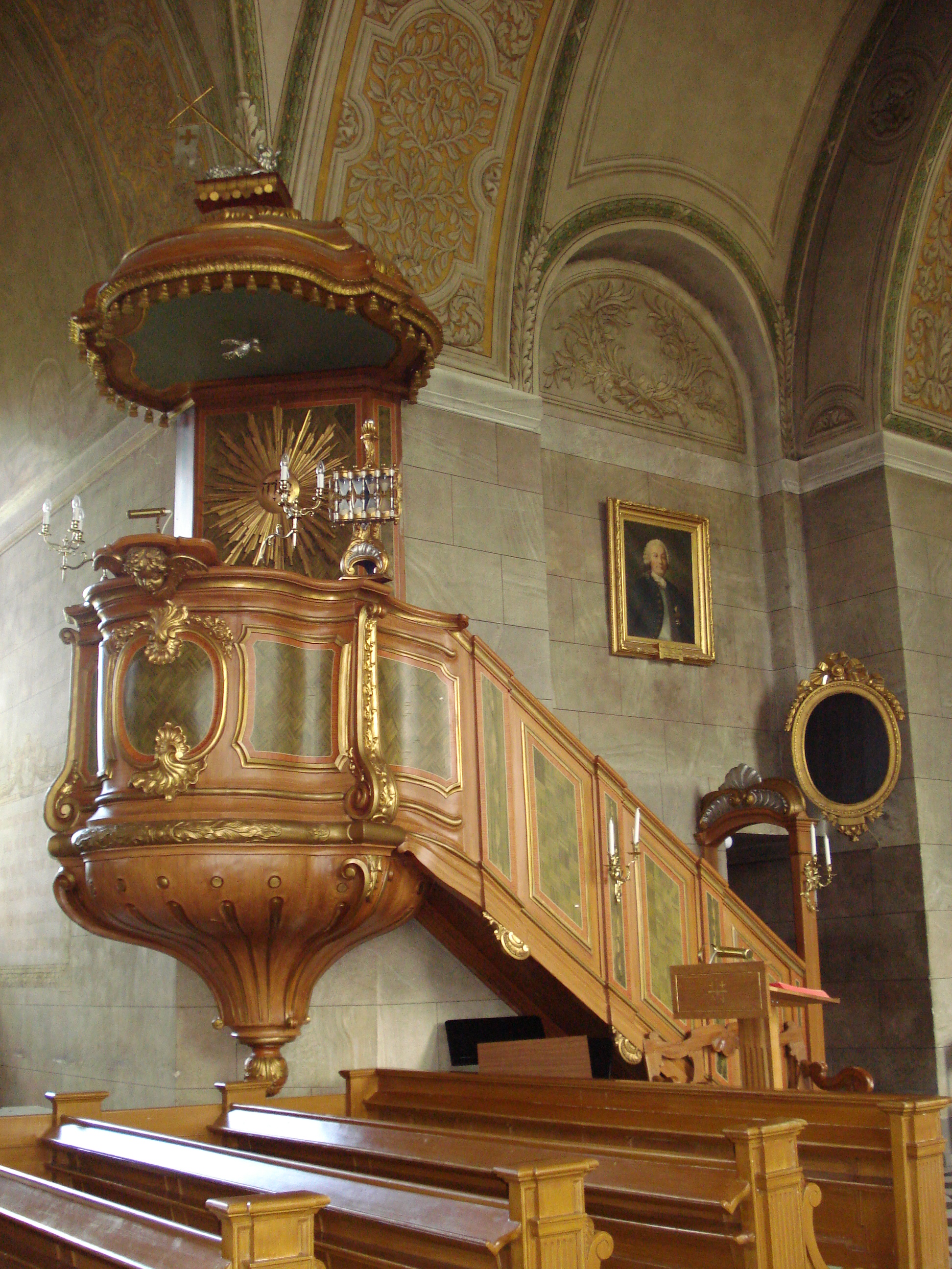 Gölunda kyrka, Västerås stift. Predikstolen